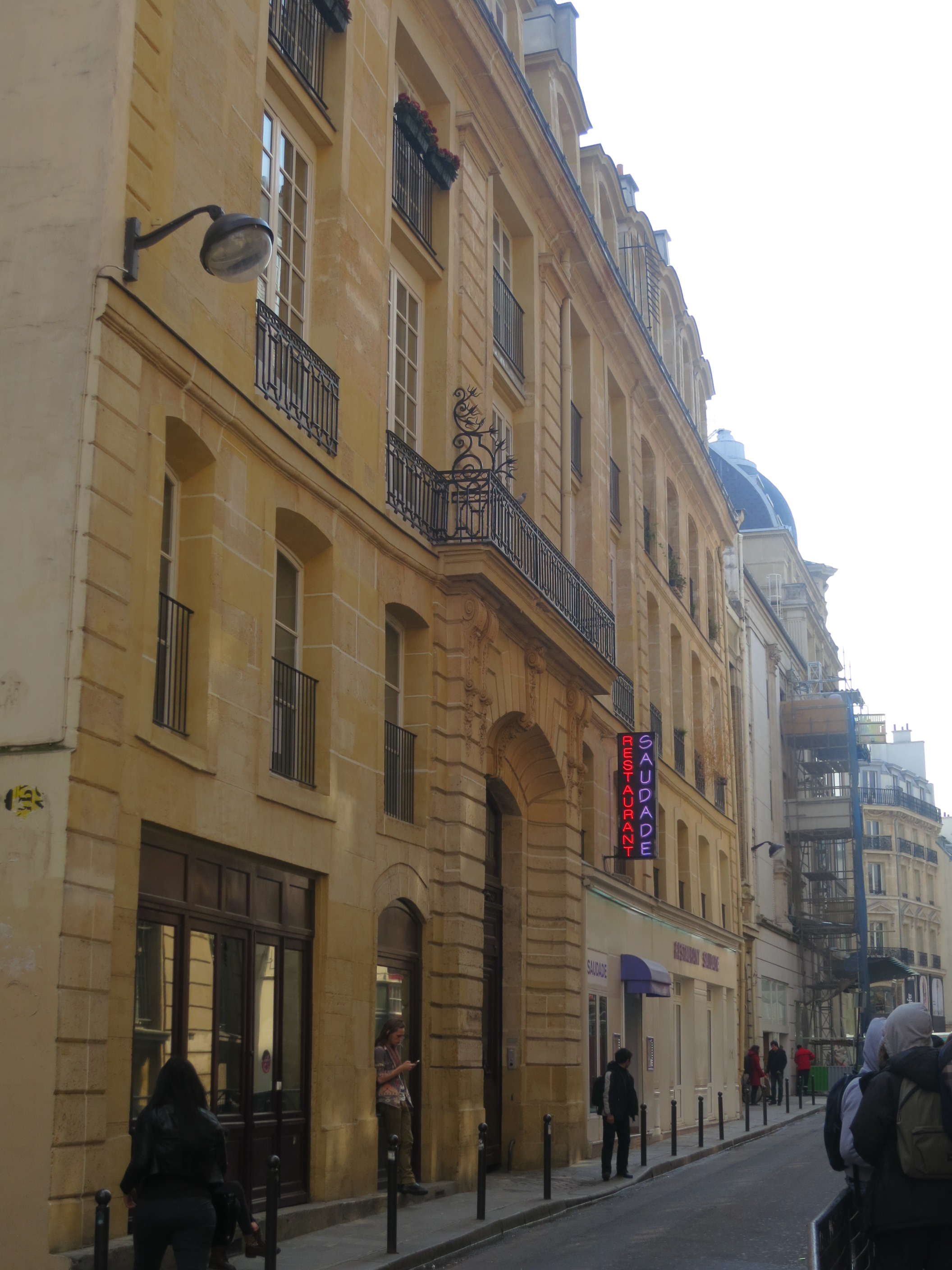 Hôtel de Villeroy (Parigi, I arrondissement)